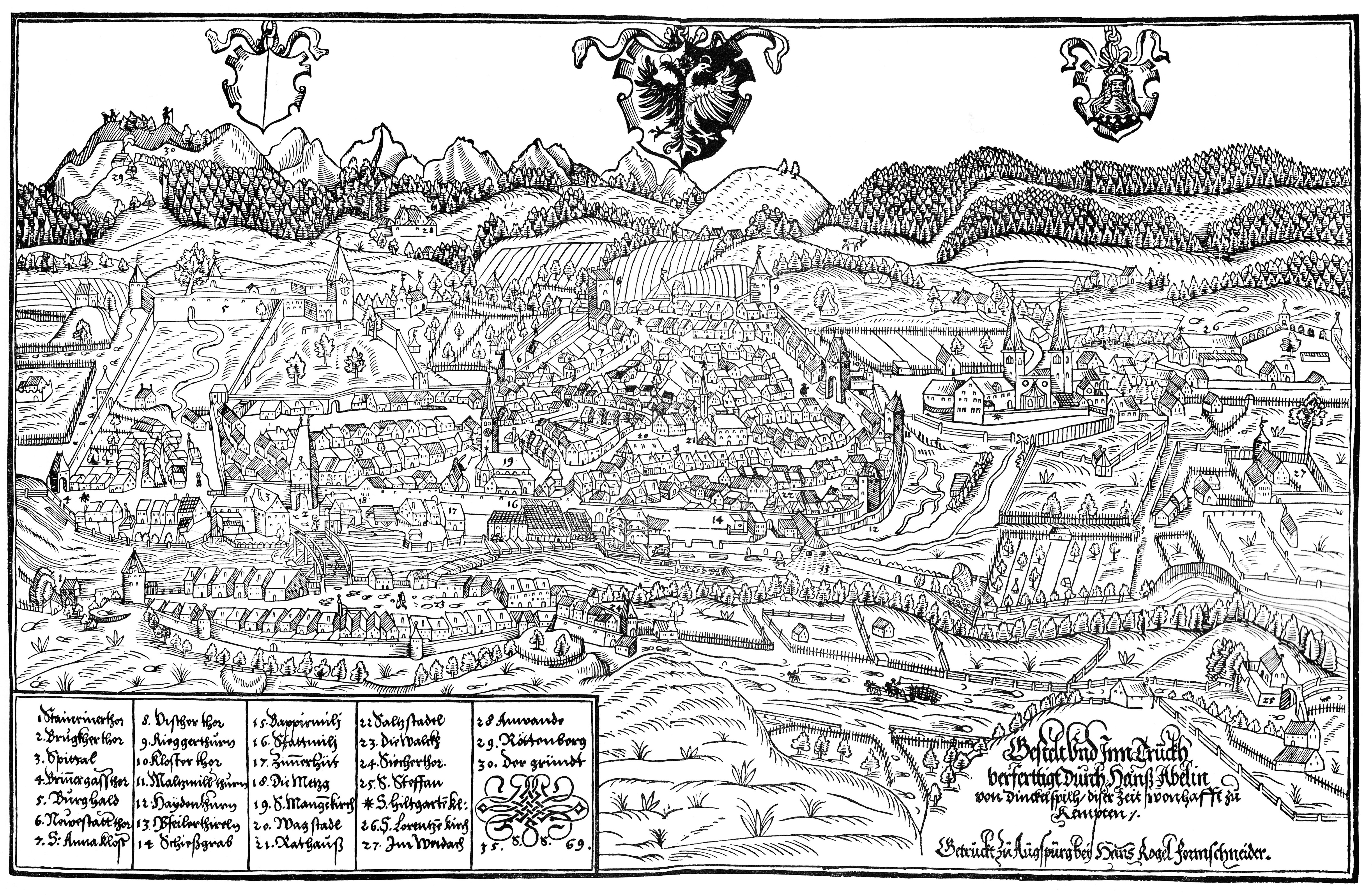 Die Stadt Kempten in einem Holzschnitt von 1569. Der älteste Abdruck den es gibt.